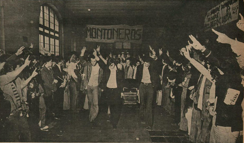 Tapa de Diario Noticias, Año I número 263 - Buenos Aires, sábado 24 de agosto de 1974. El título de la nota es "Sepultan a peronistas fusilados en Quilmes". El epígrafe de la foto es "A días de la masacre de La Plata nuevos fusilamientos de peronistas. Sus compañeros despiden a Beckerman, 19 años, de la UES." (UES: Unión de Estudiantes Secundarios).